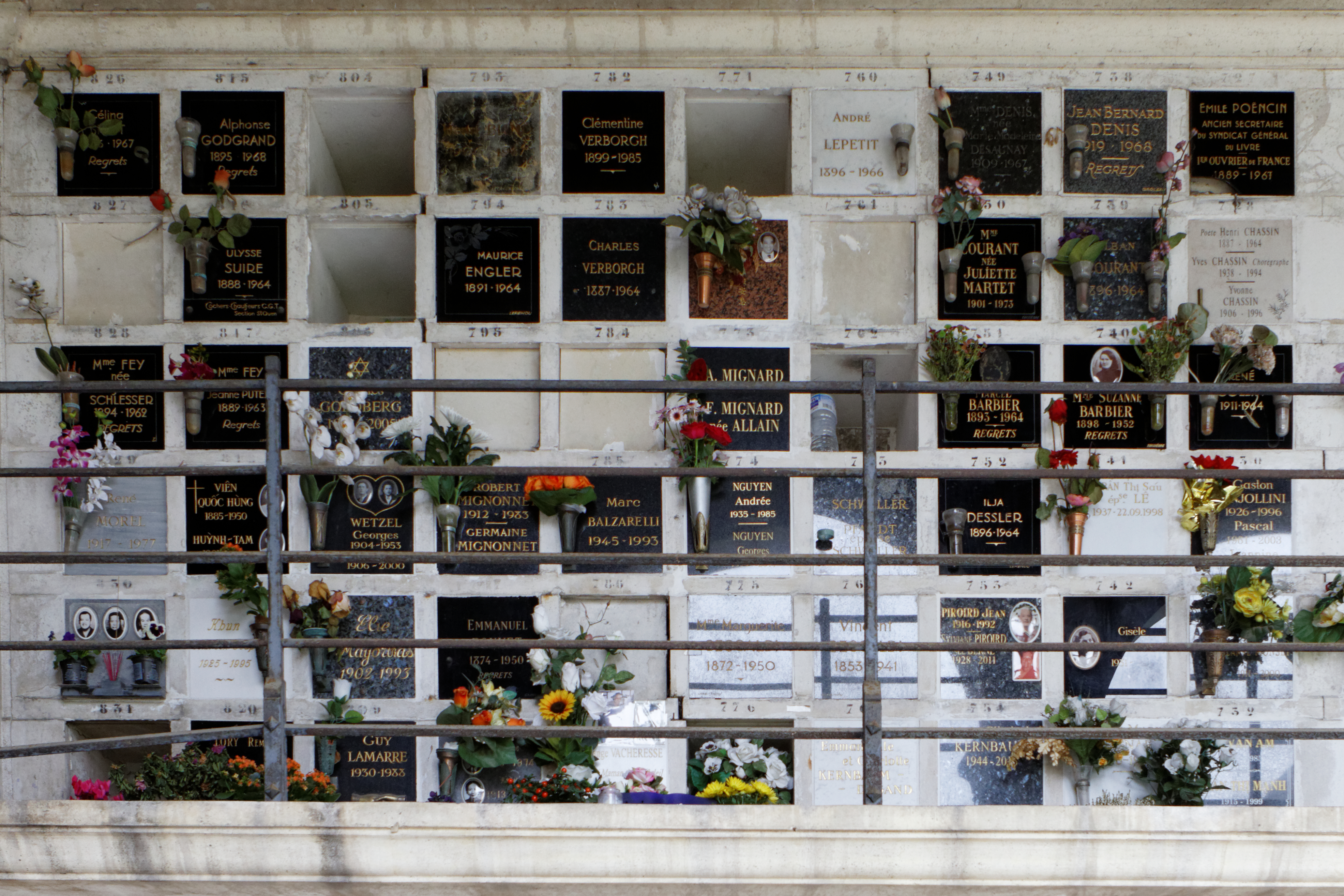 Cases du columbarium du cimetière du Père-Lachaise.